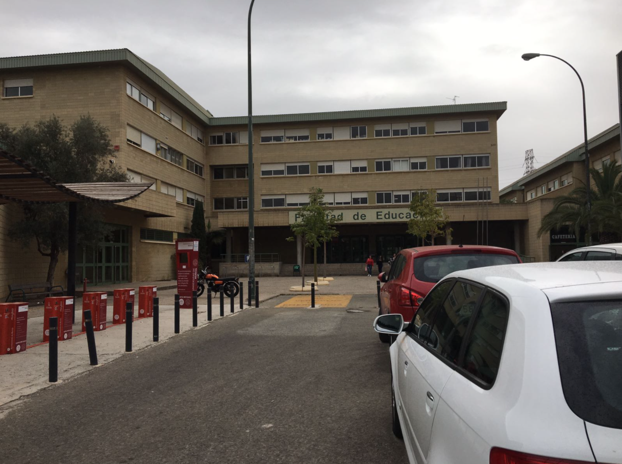 Foto de la facultad de educación de la Universidad de Murcia